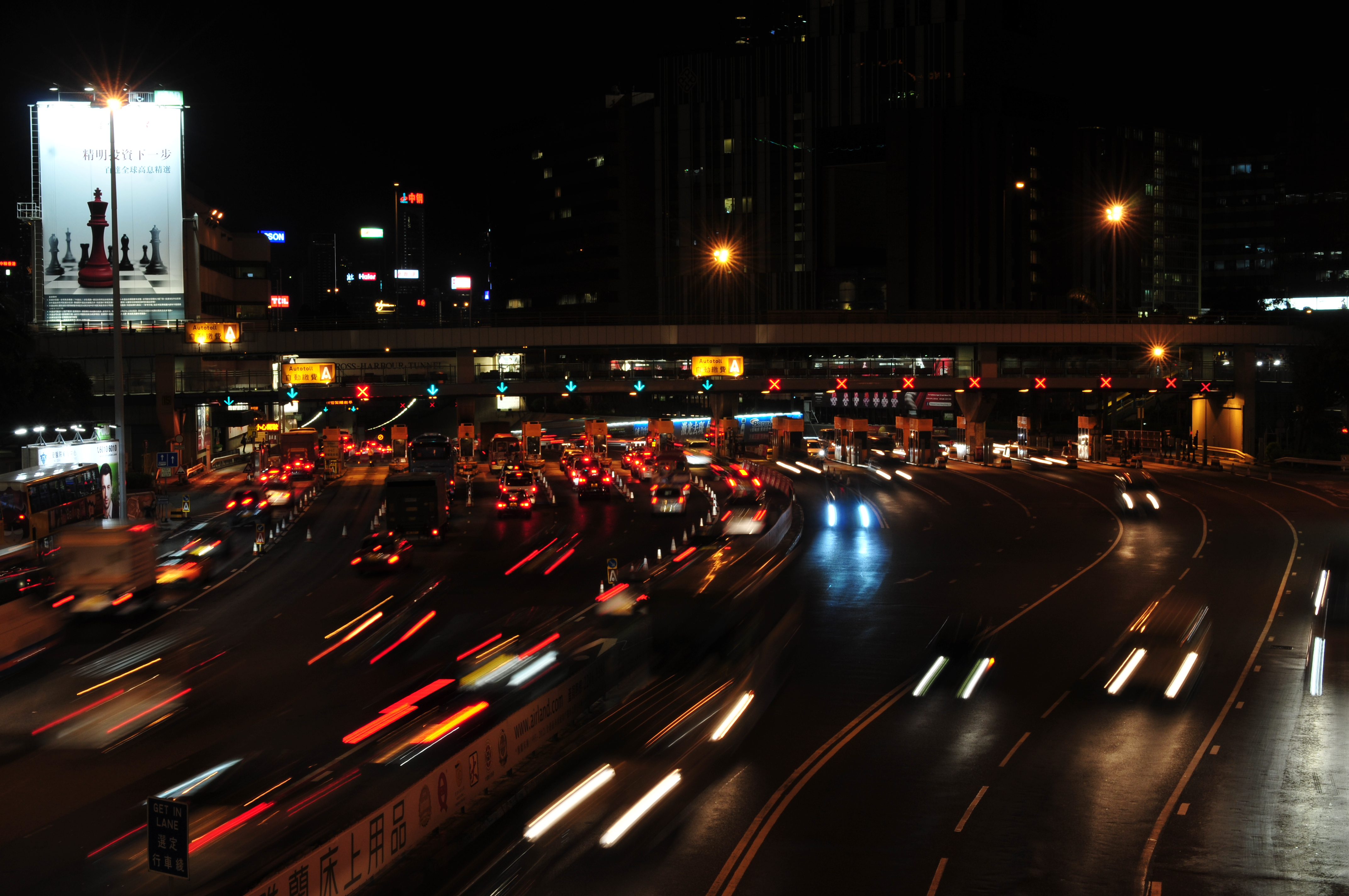 Wikimania 2013 Hongkong